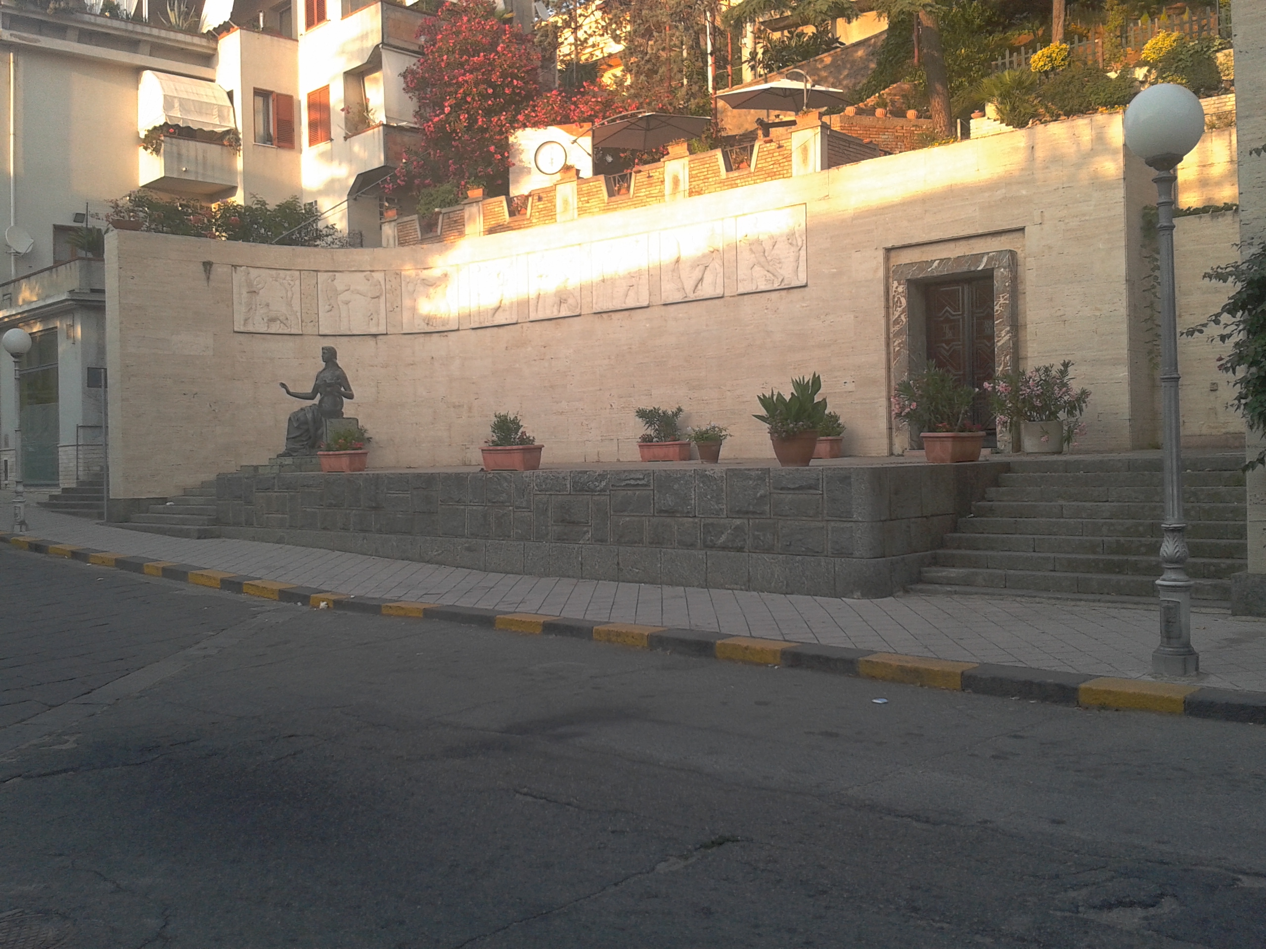 Palmi. Mausoleo dedicato a Francesco Cilea. Fotografia scattata dalla via Salerno